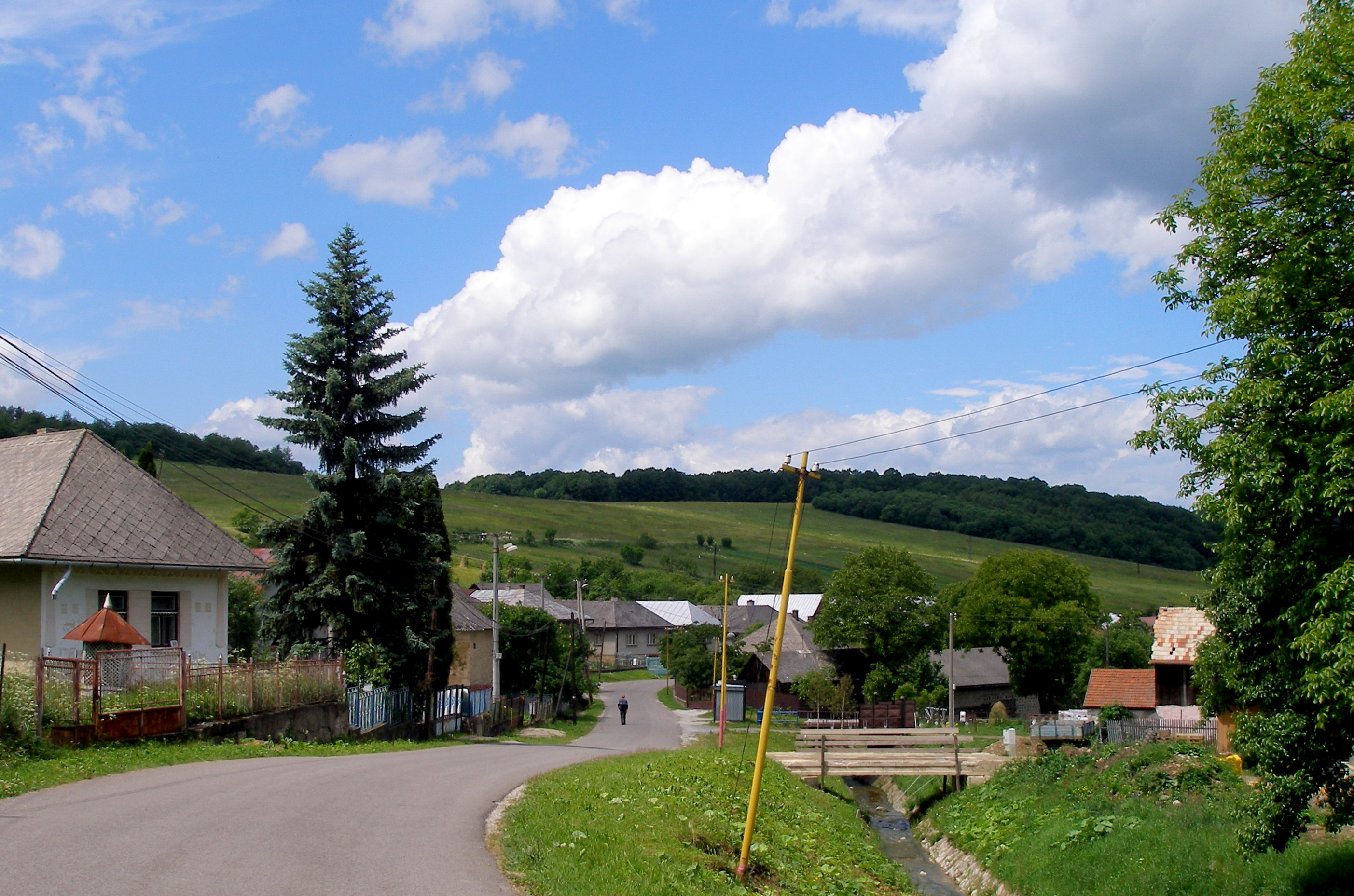 Obec Jakovany okres Sabinov.